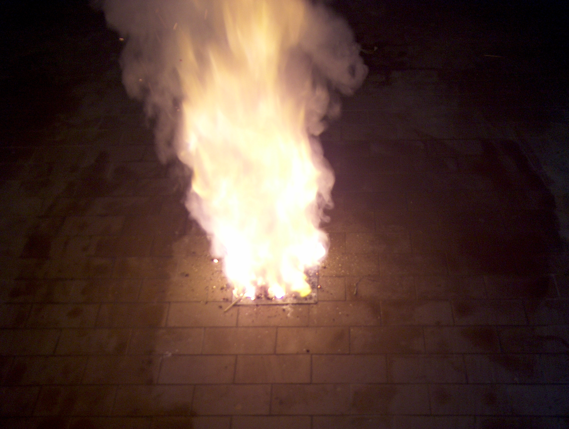 Reazione chimica con emissione di energia luminosa (Clorato di potassio e Saccarosio) Ho fatto io questa immagine. Fabexplosive